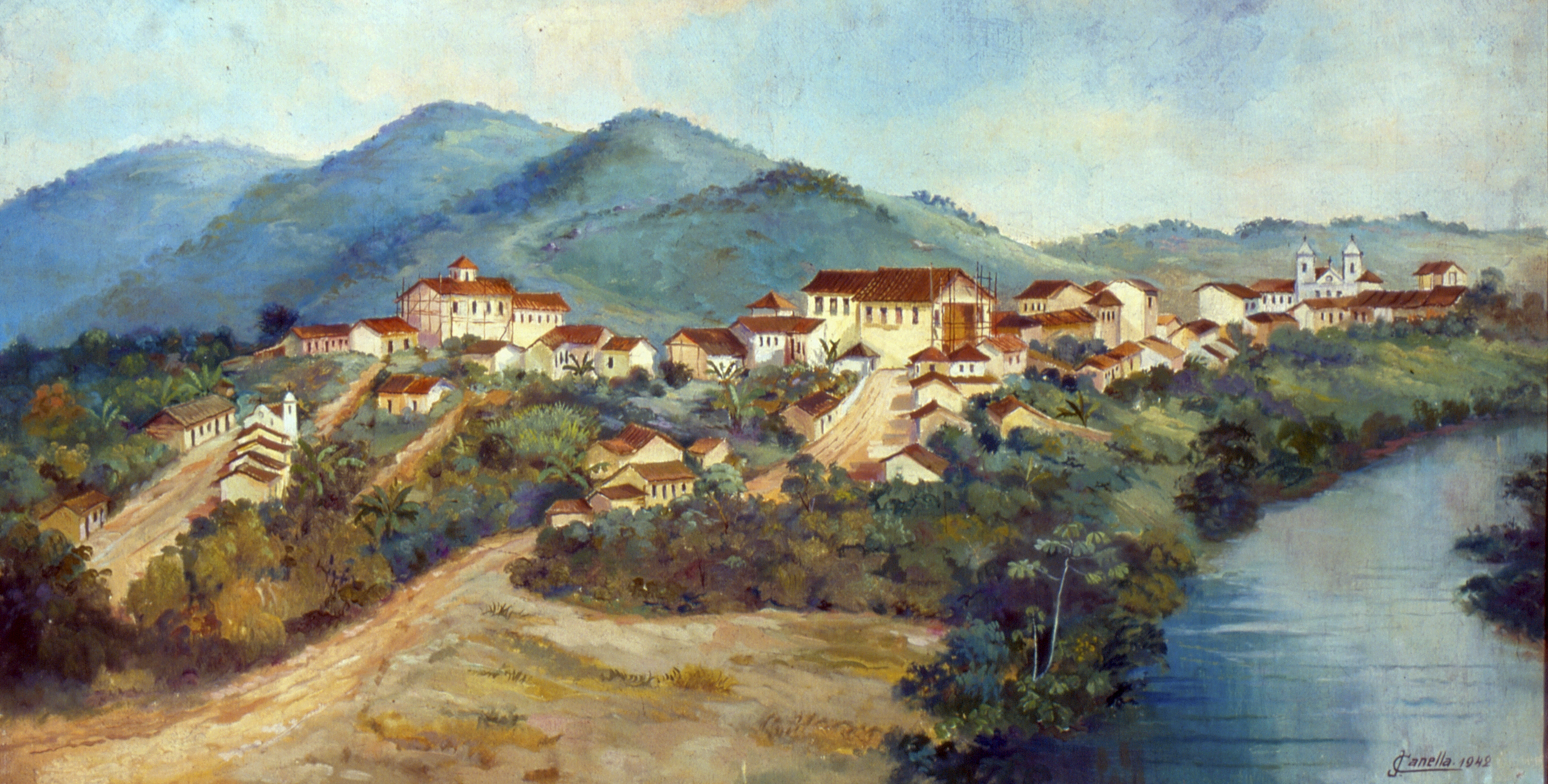 Obra que integra o acervo do Museu Paulista da USP. Coleção Fundo Museu Paulista - FMP